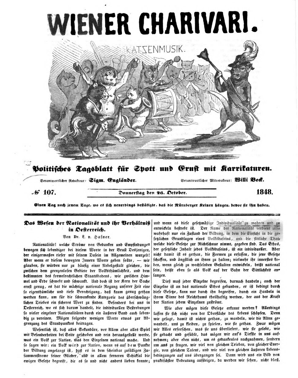 Wiener Katzen-Musik 26. Oktober 1848, Ausgabe 107